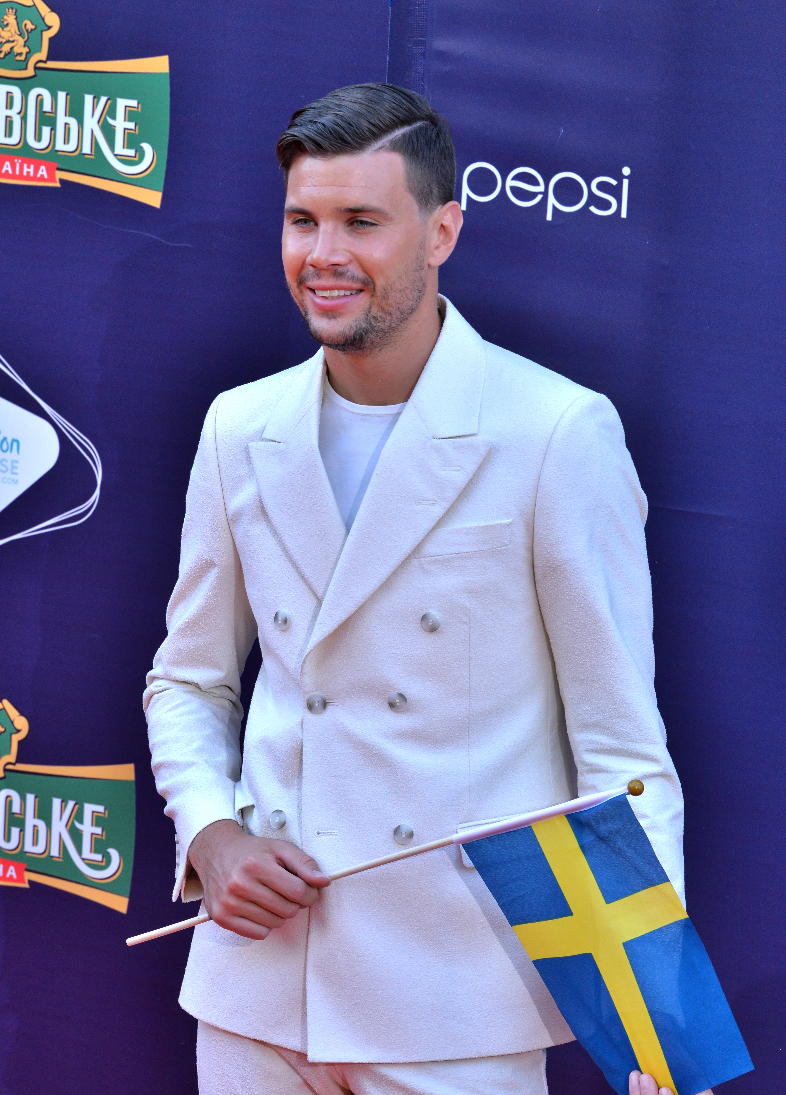 Шведський співак Робін Бенгтссон на церемонії відкриття пісенного конкурсу Євробачення 2017 у Києві